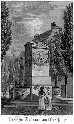 Nürnberg, Der neue Brunnen am Maxplatz (Dürer-Pirckheimer-Brunnen)